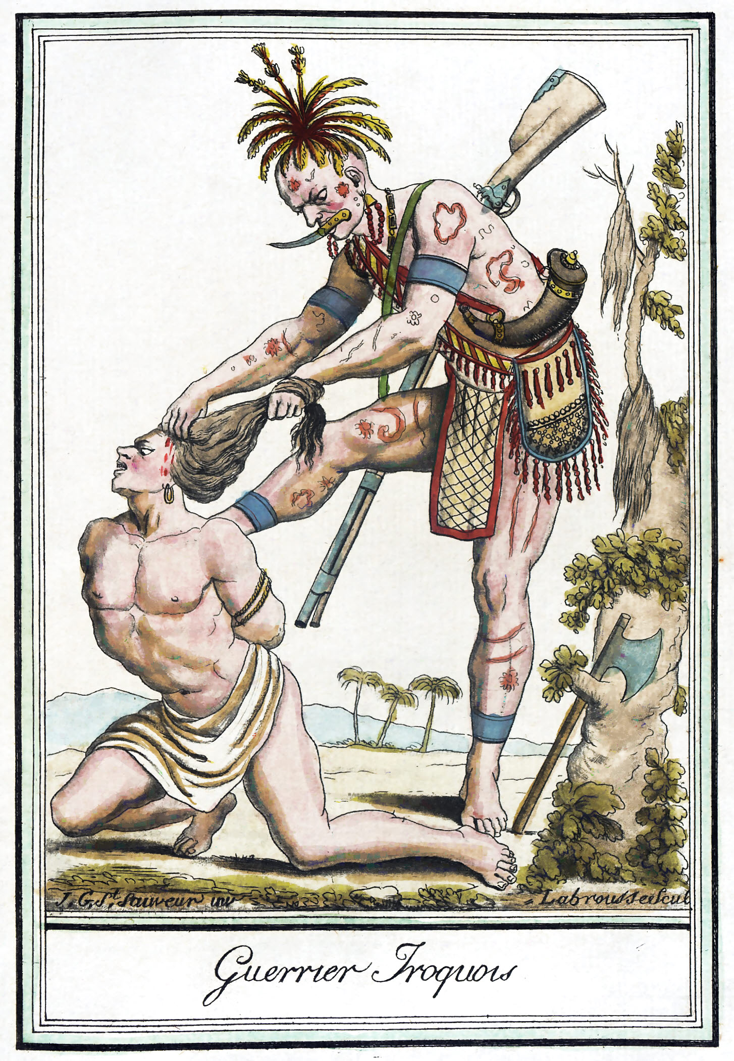 Costumes de Différents Pays, 'Guerrier Iroquois'